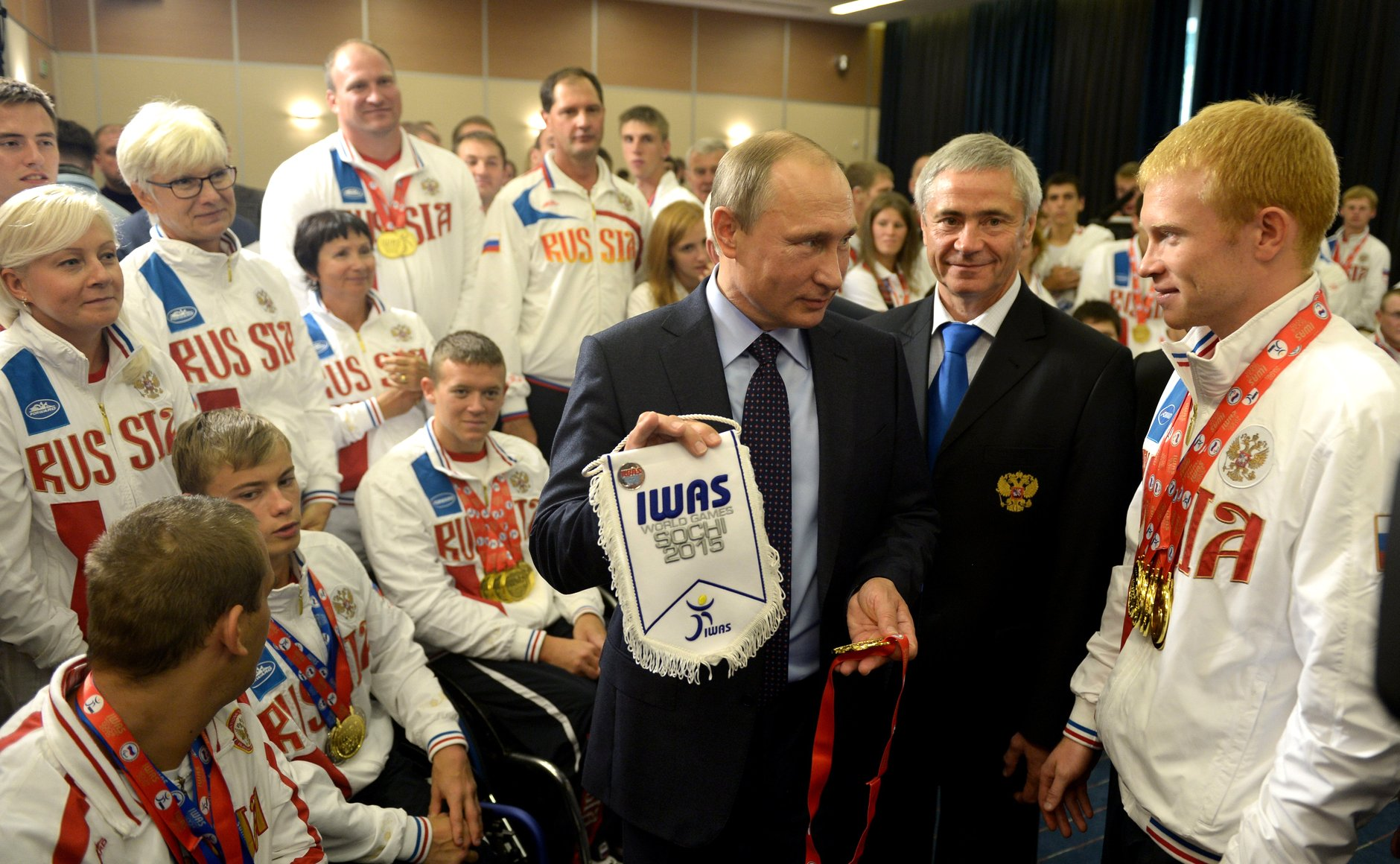 Встреча Владимира Путина с победителями международных спортивных игр для колясочников и ампутантов 2015 года в Сочи